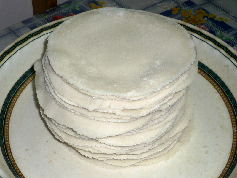 പത്തിരി ഉണ്ടാക്കുന്ന വിധം 8